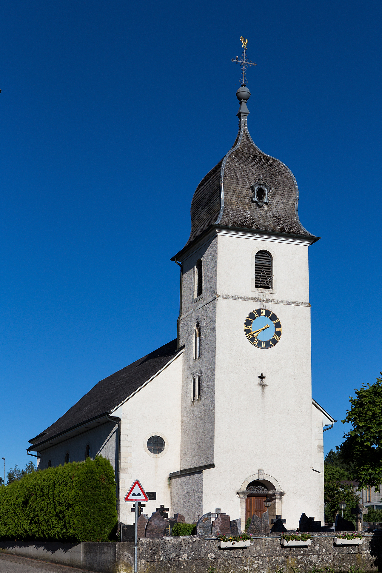 Eglise St-Pierre à Fahy